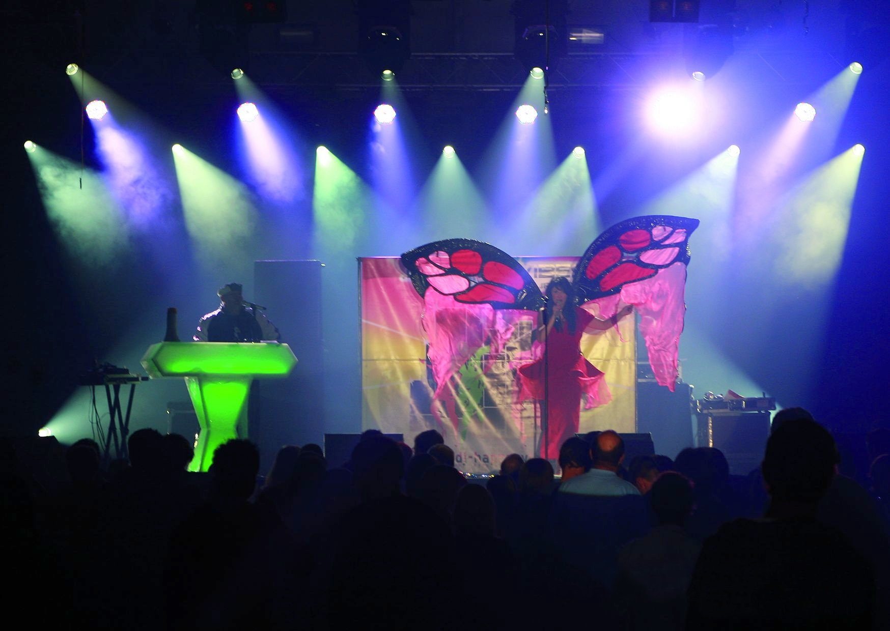 DJ Happy Vibes feat. Jazzmin Liveshow